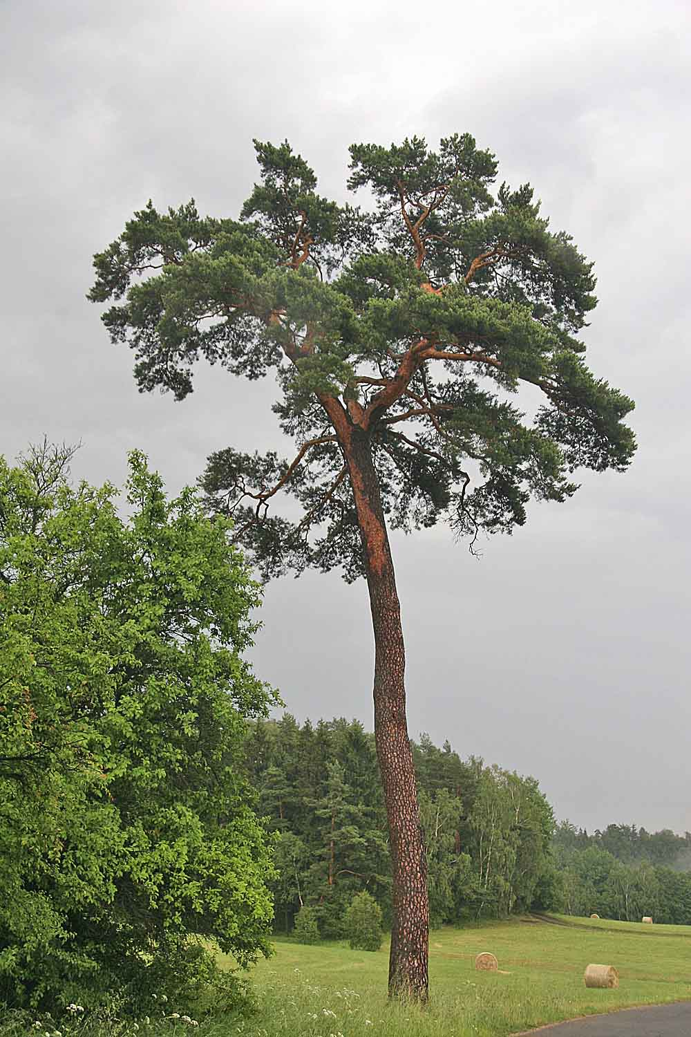 Památná borovice lesní u obce Mařenice